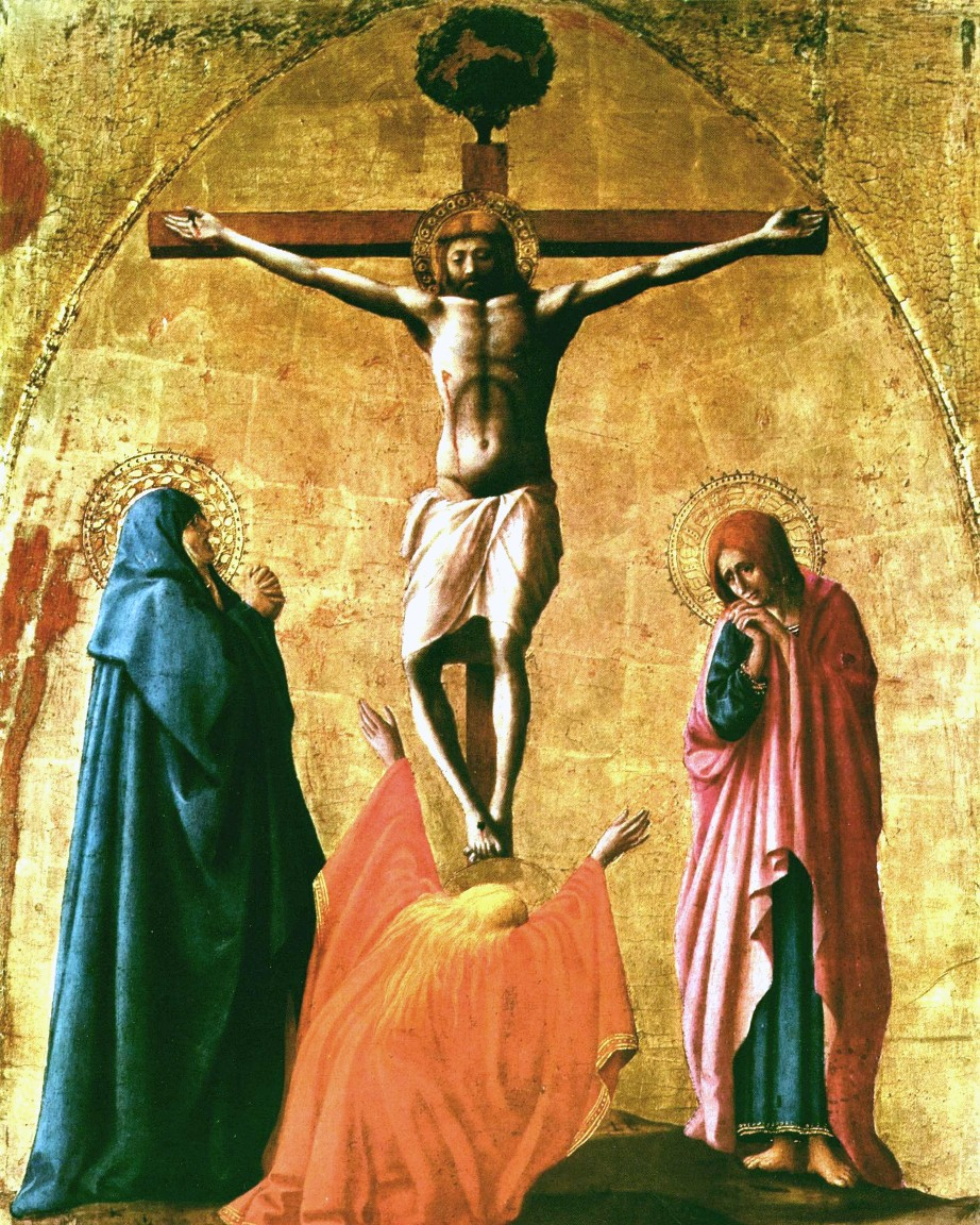 Masaccio, Crucifixion